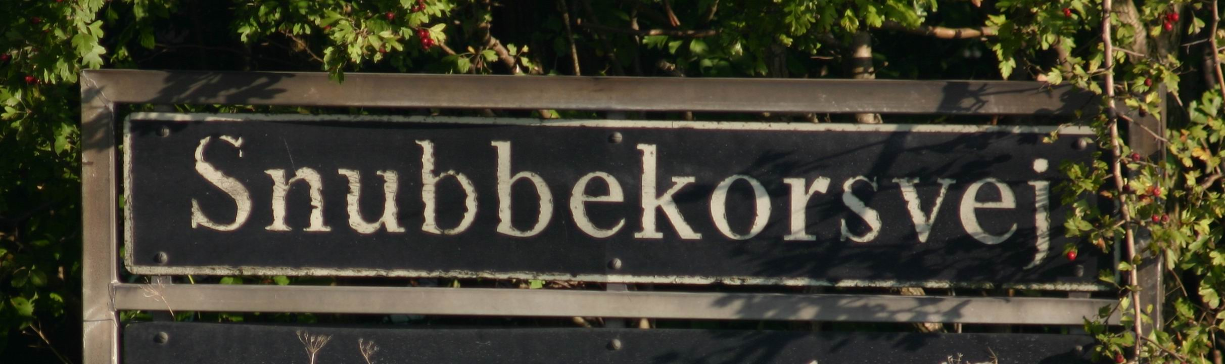 Street Sign, Snubbekorsvej, Vridsløsemagle, Denmark